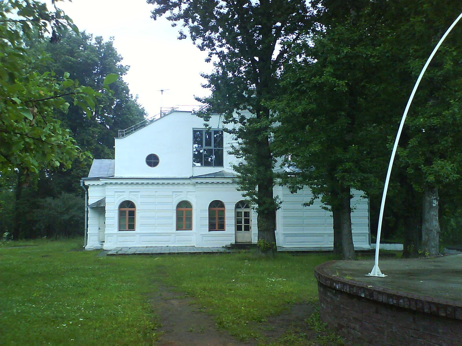 Фото городской усадьбы "Белая Дача", г. Минск. This is a photo of Belarusian heritage monument. Reference number: 713Г000041 ( WLM)